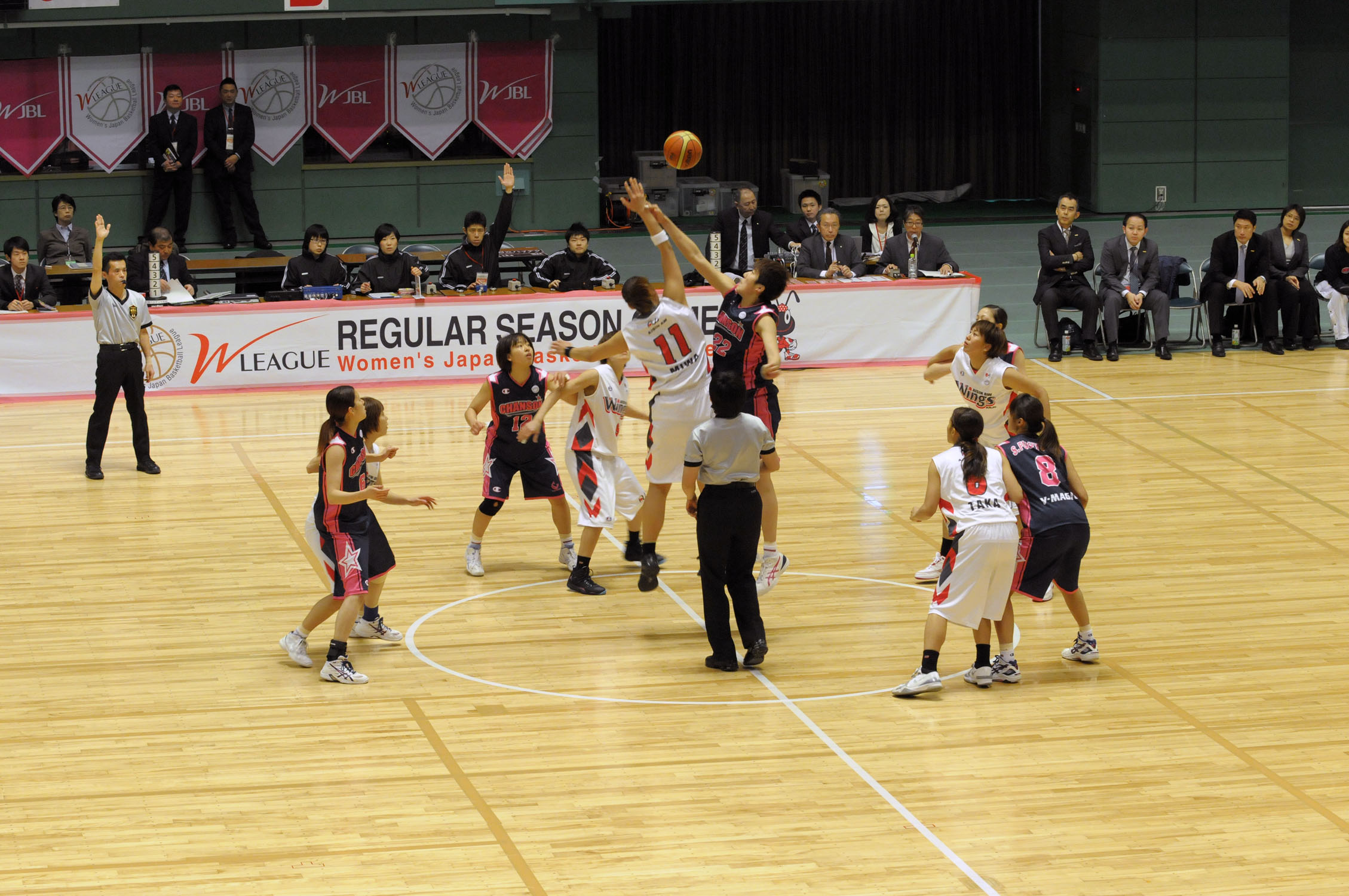 WJBL 13-14レギュラーリーグ、アイシンAWウィングス対シャンソンVマジック。横須賀アリーナ。